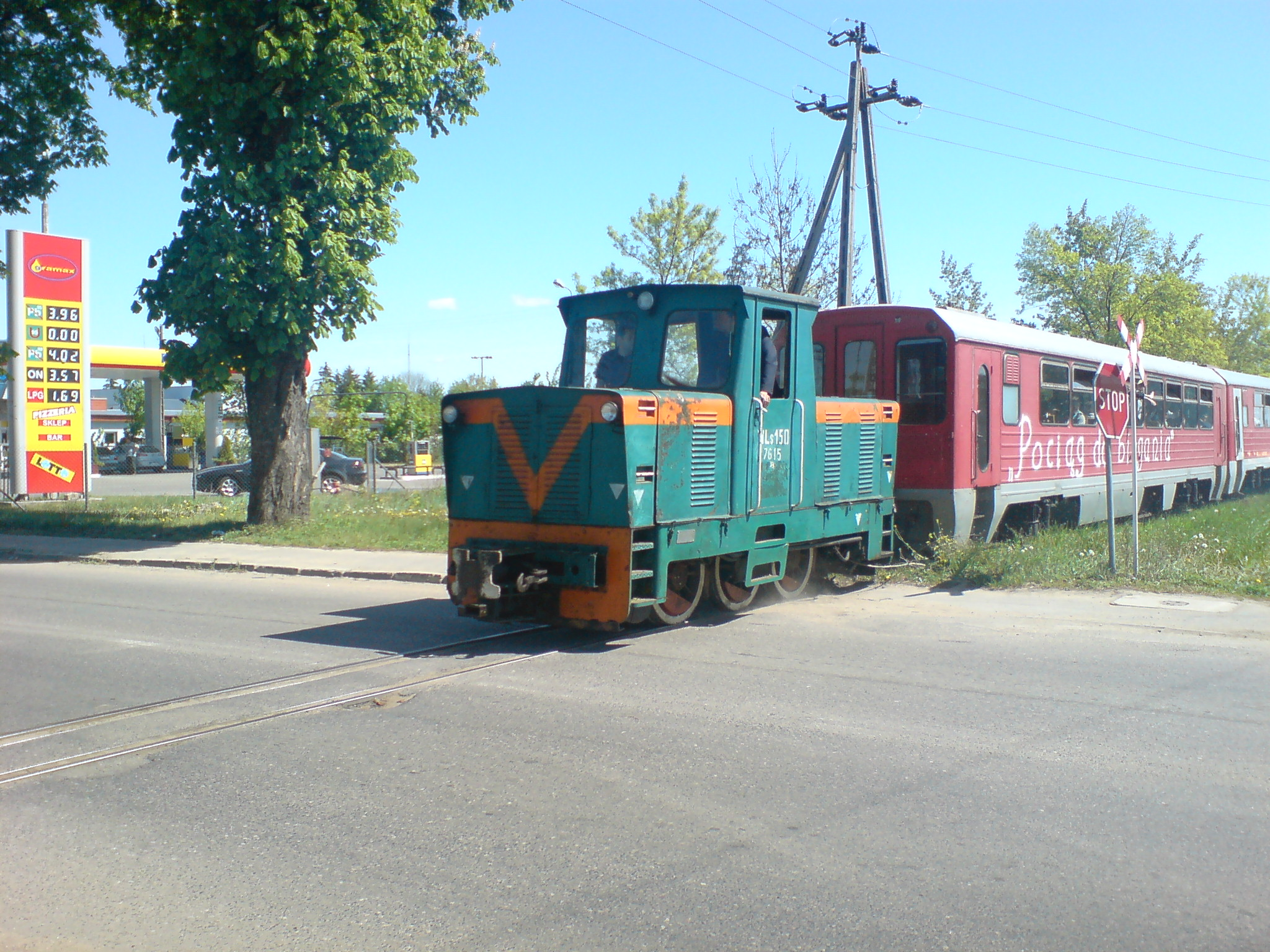 Wąskotorowa lokomotywa spalinowa typu Wls150 przejeżdżająca przez Przasnysz